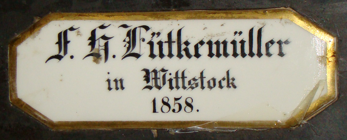 Lütkemüller-Schild von 1858 an der Orgel in der Kirche von Groß Gievitz. Foto: Peter Schmelzle 2011